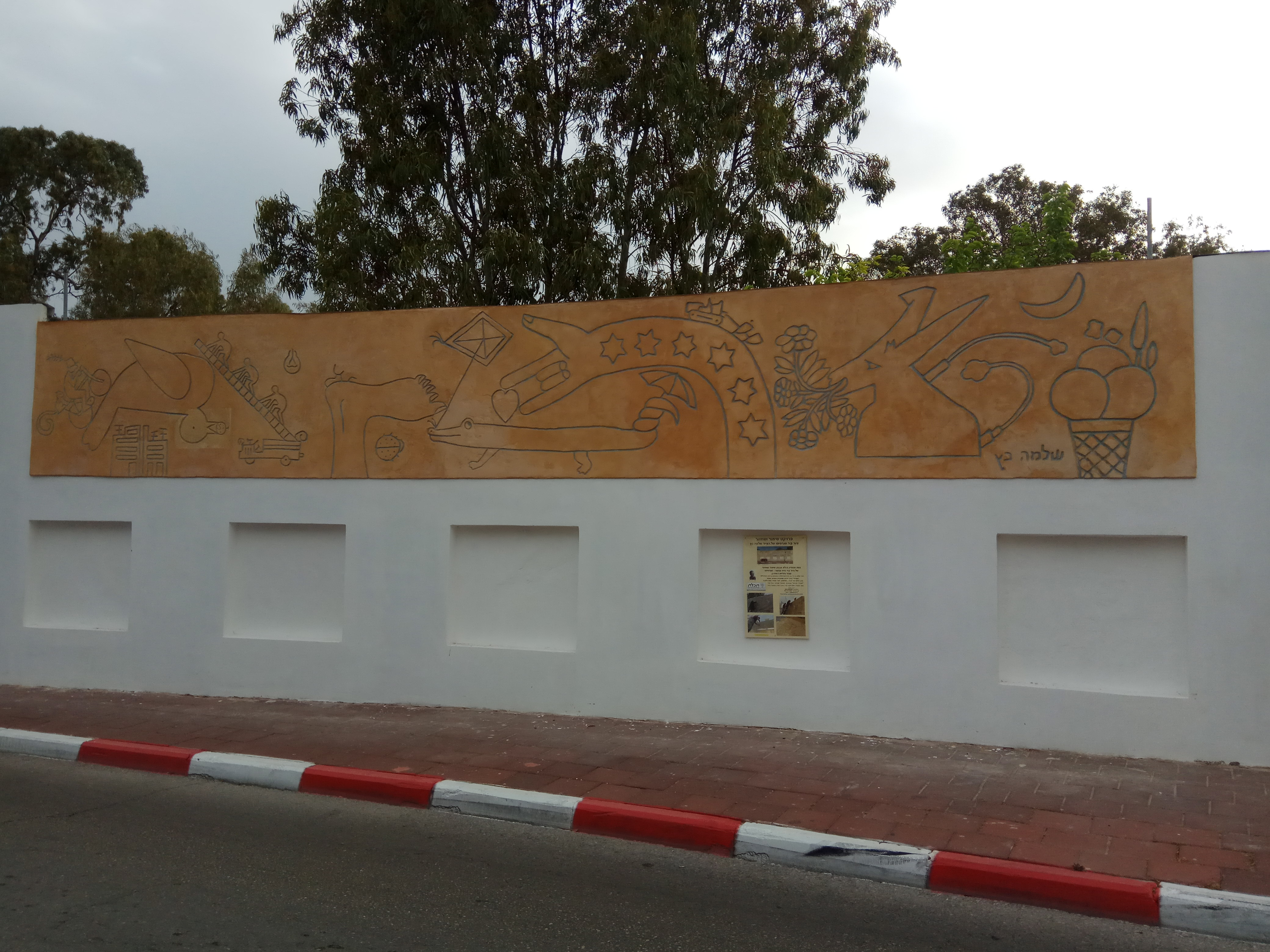 ציור סגרפיטי של שלמה כץ (1937-1992) על קיא האמפיתיאטרון ברחוב שרת ברמת גן